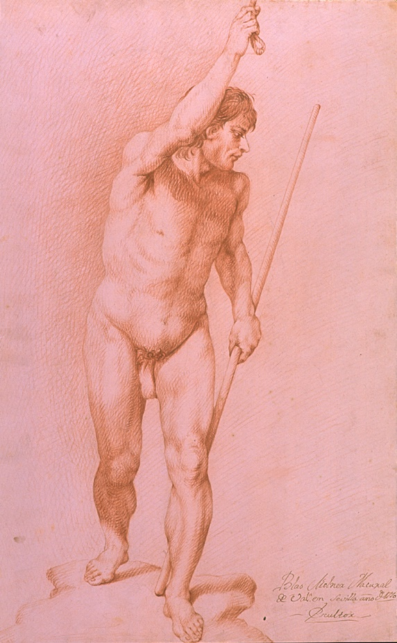 Blas Molner, Desnudo masculino caminando con un cayado mientras eleva la mano para coger una cuerda, inscripción: "Blas Molner Natural / de Valª. en Sevilla año 1770 / -Escultor-" Universidad Complutense de Madrid, Facultad de Bellas Artes, Dibujos de Academia